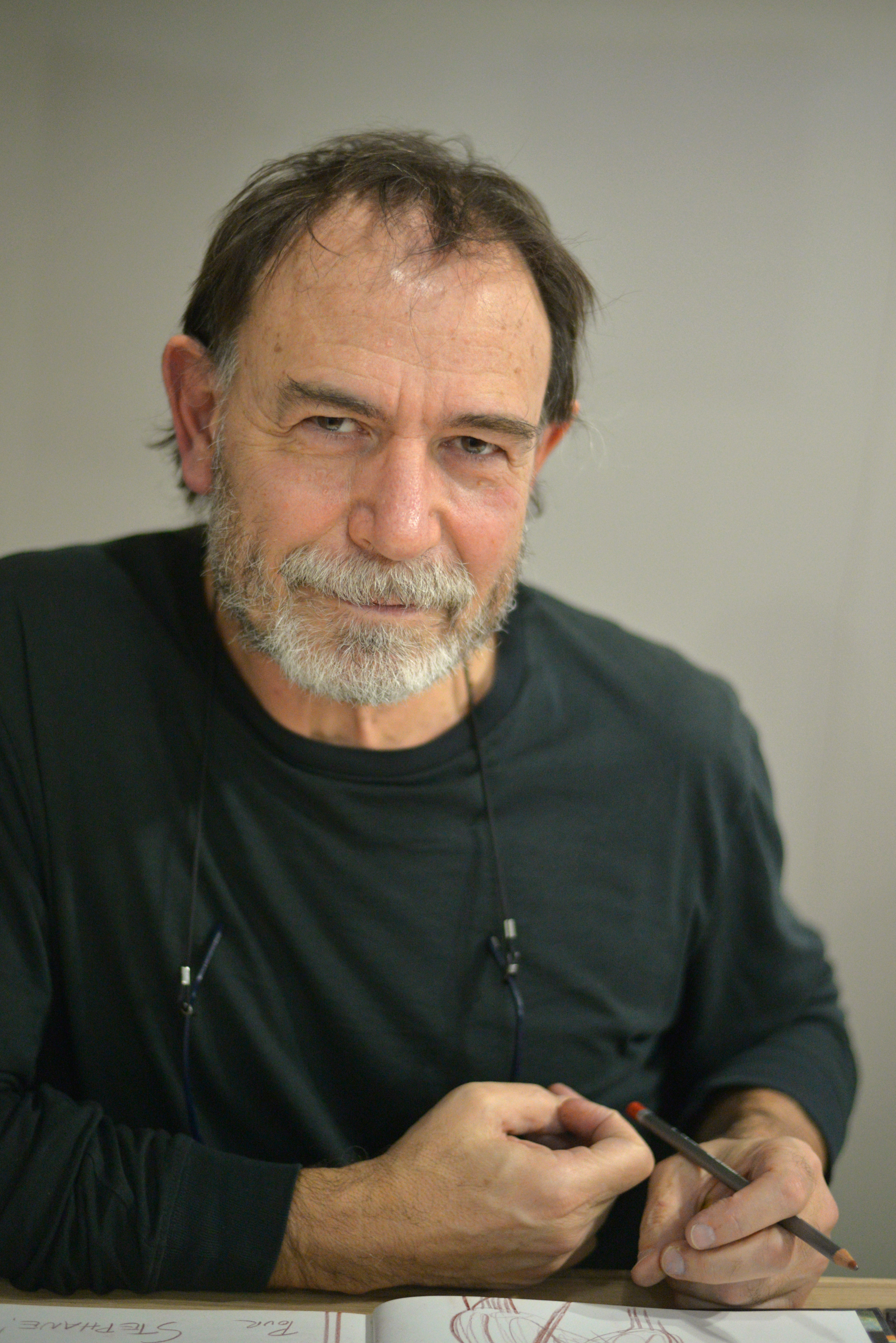 Lorenzo Mattotti au Festival International de la BD d'Angoulême 2015.